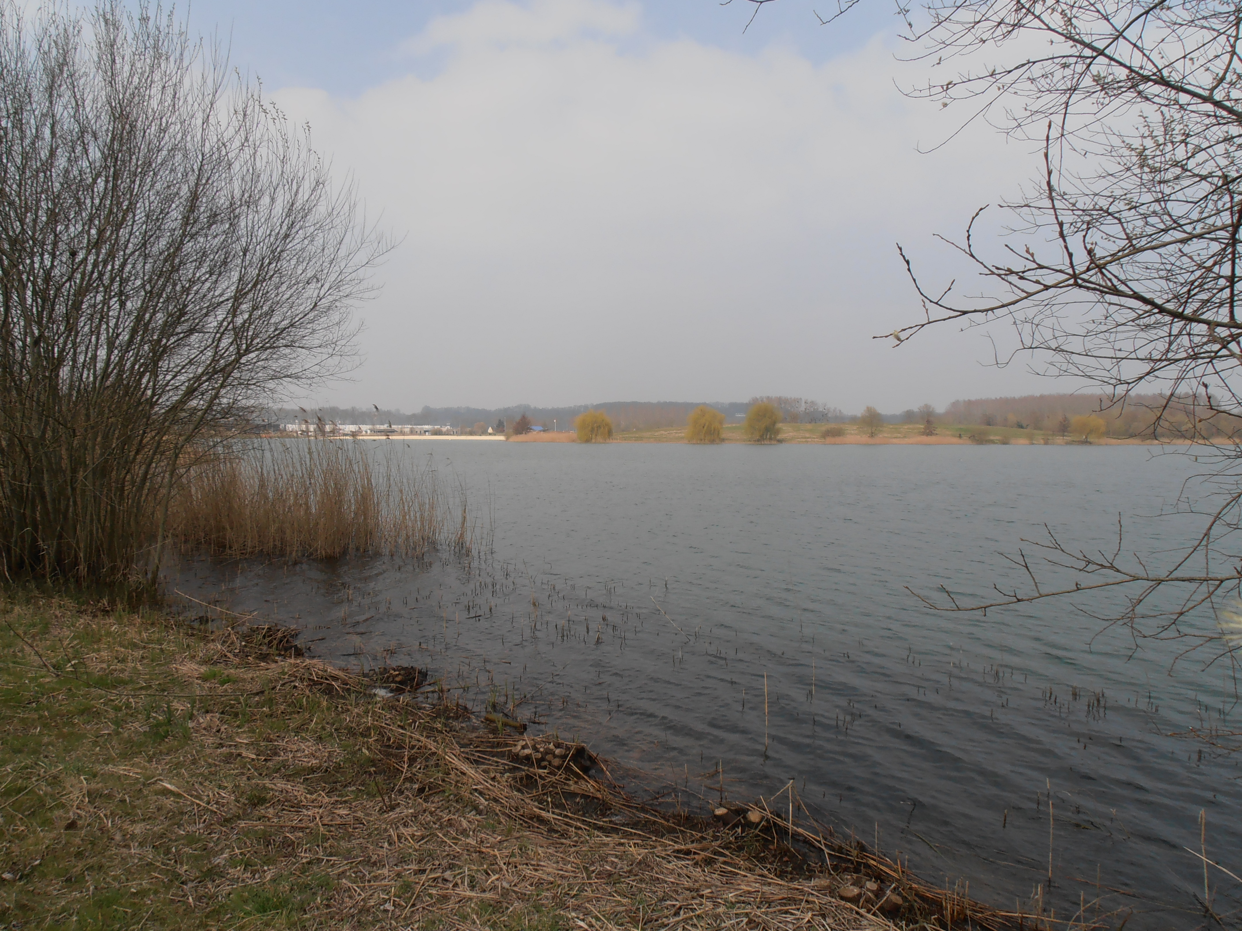 Le lac de la Monnerie